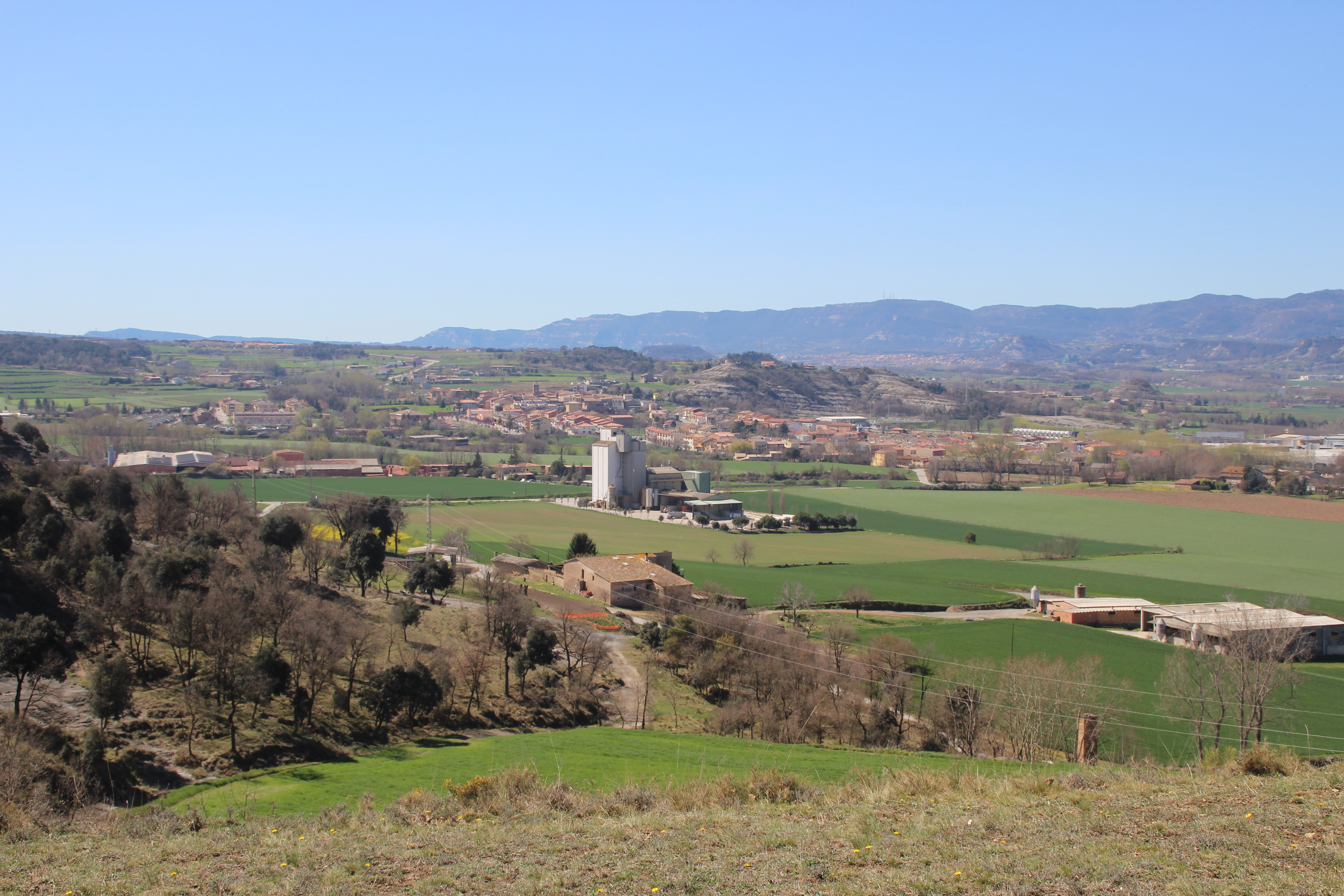 panoràmica